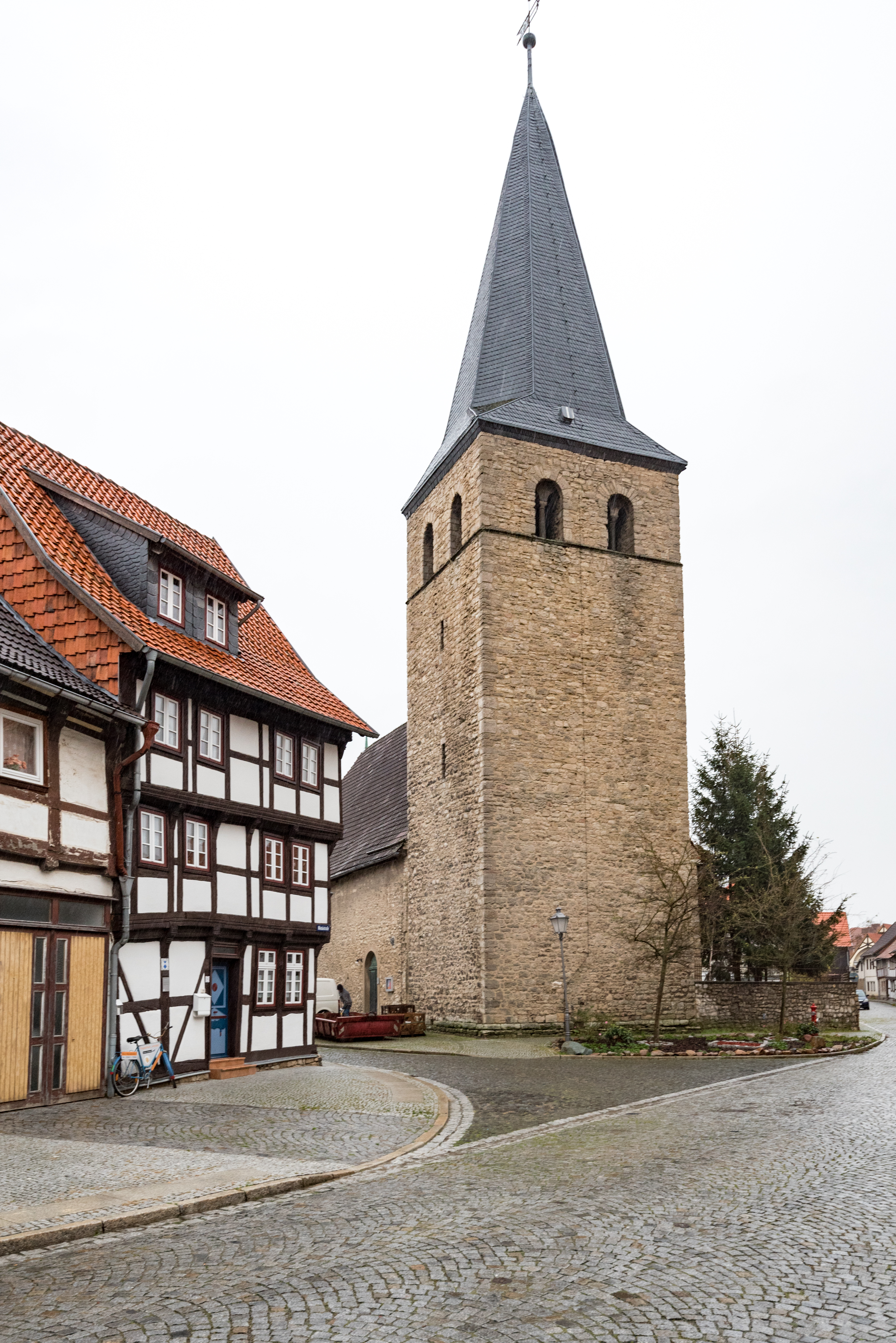 Osterwieck, Nikolaikirchplatz, Nikolaikirche